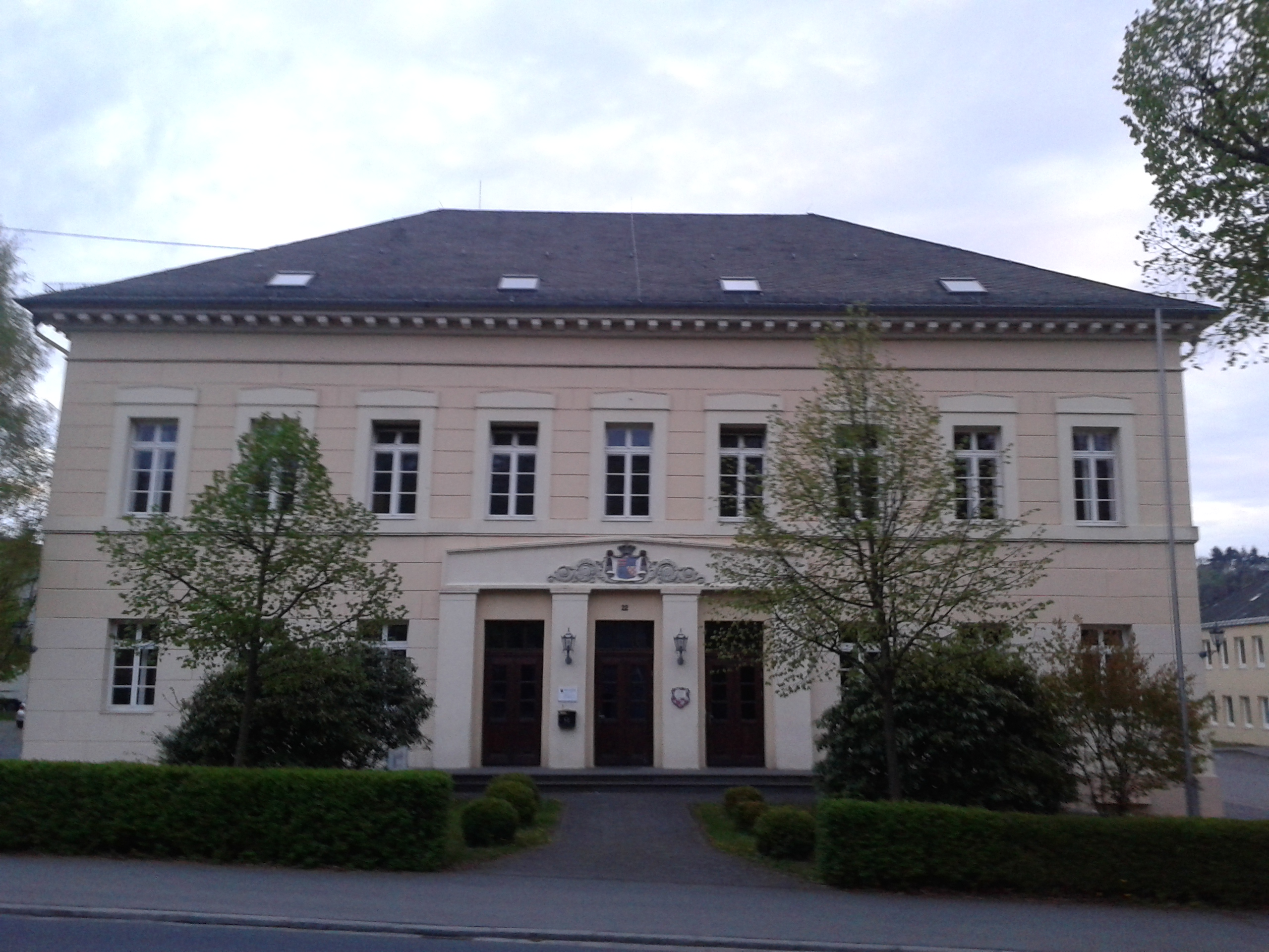 Kulturdenkmal Schneewiesenstraße 22 Birkenfeld Nahe